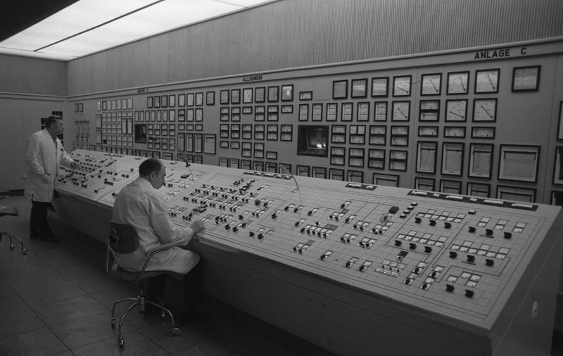 VW-Werk, Wolfsburg Kraftwerk